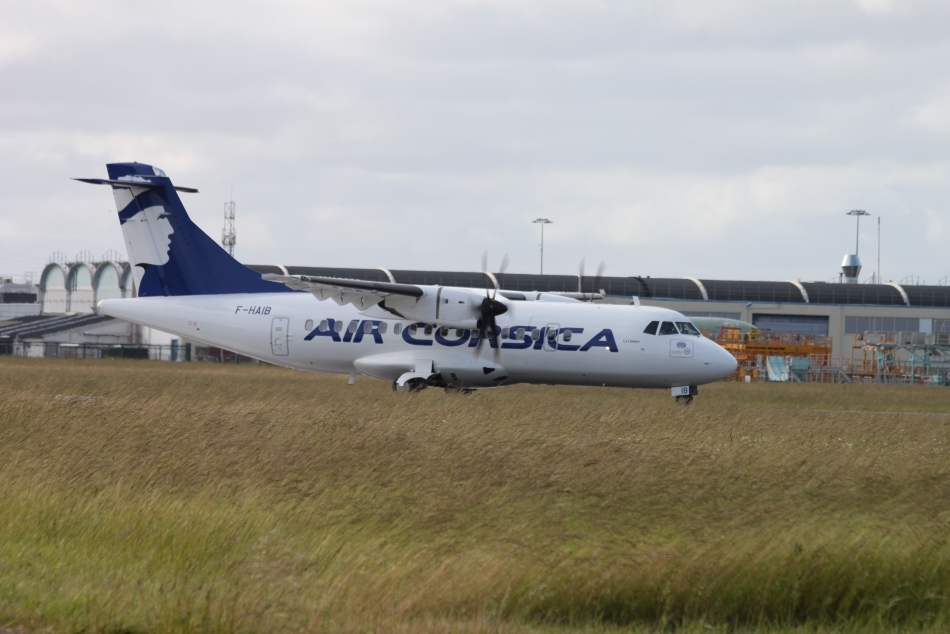 ATR 42-500 n° F-HAIB d'Air Corsica sur l'aéroport de Saint-Nazaire (44)